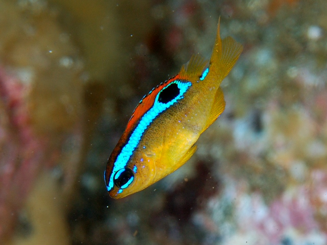 ミヤコキセンスズメダイ Chrysiptera brownriggii